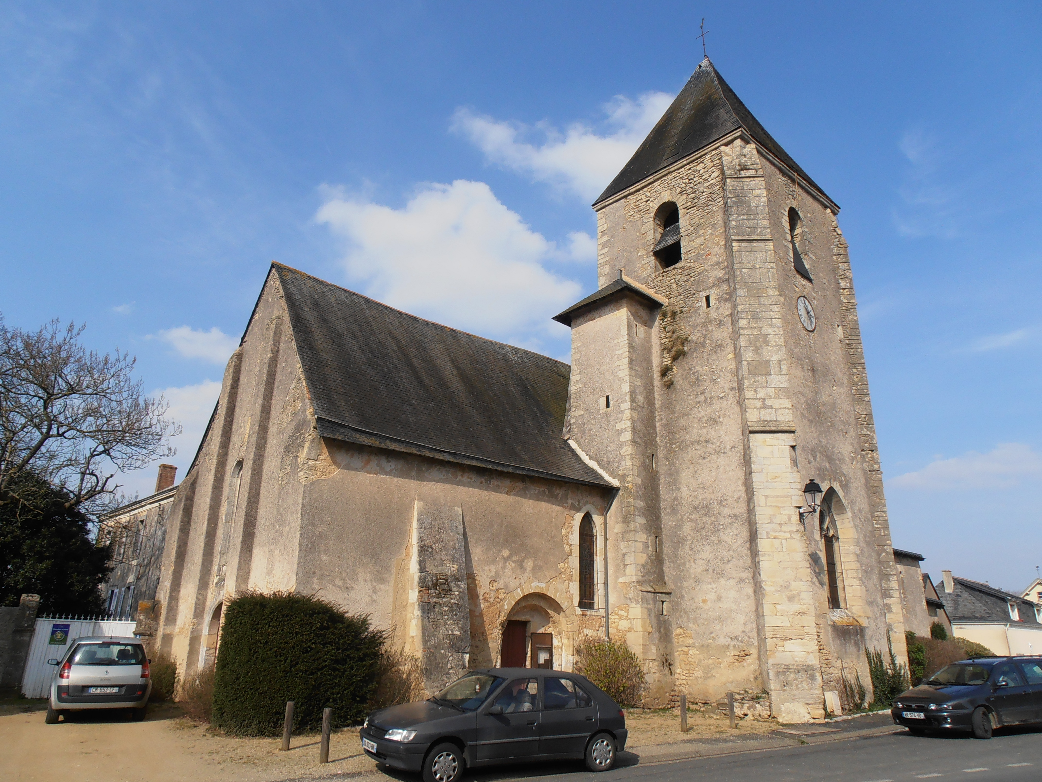 Église Saint-Jean-Baptiste de Lézigné (Maine-et-Loire, France).